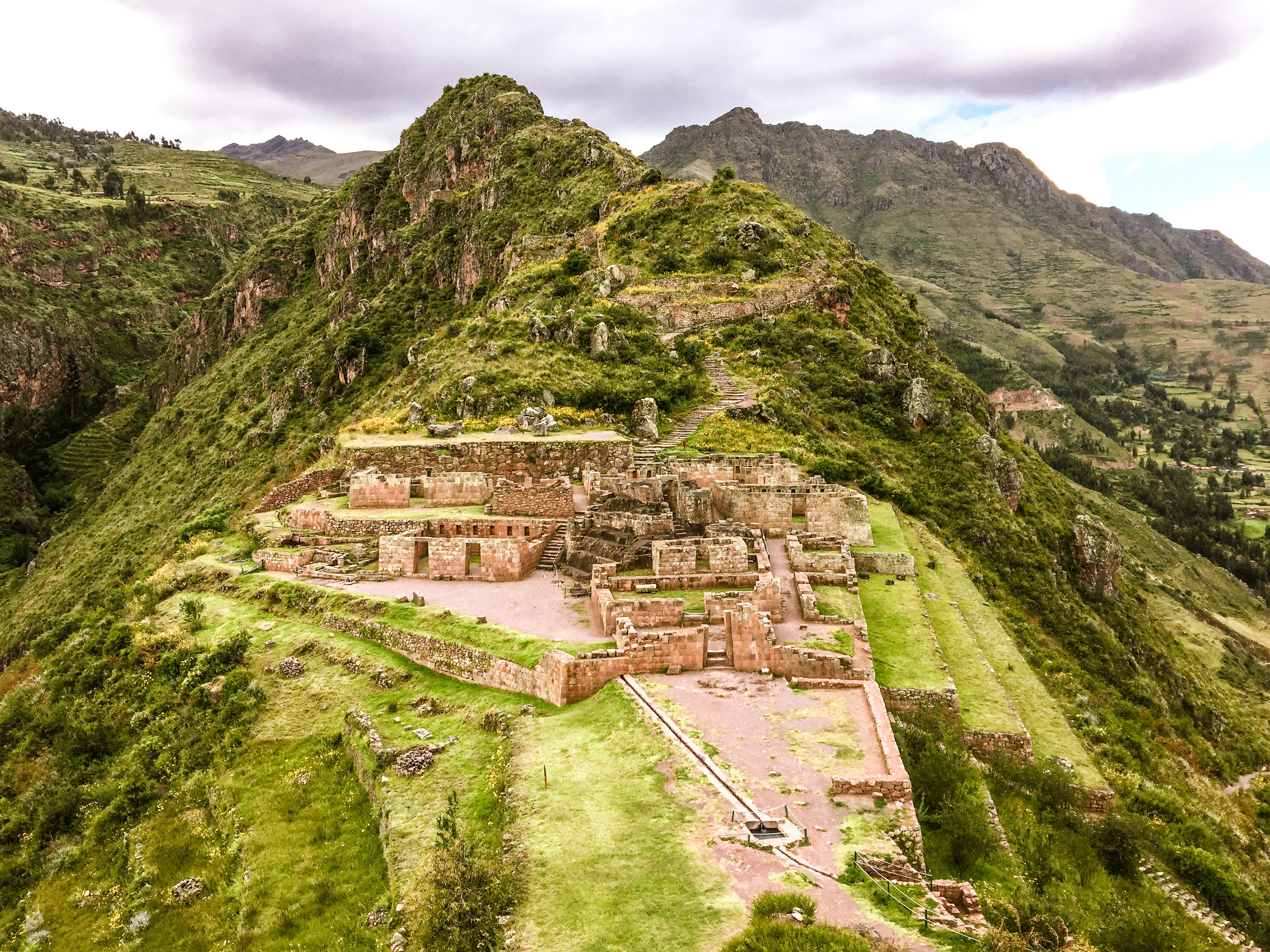 Pisac, Cusco, Peru